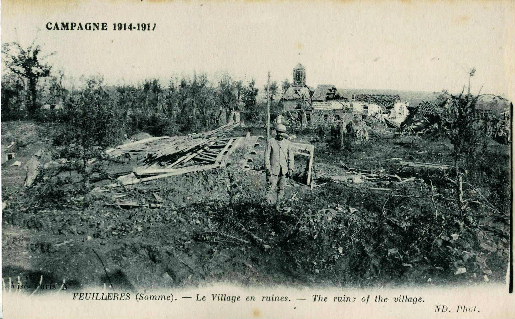 Carte postale ancienne éditée par ND, collection Campagne 1914-1917 :FEUILLÈRES - Le village en ruines